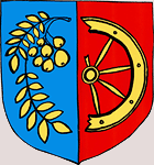 znak obce Zlámanec